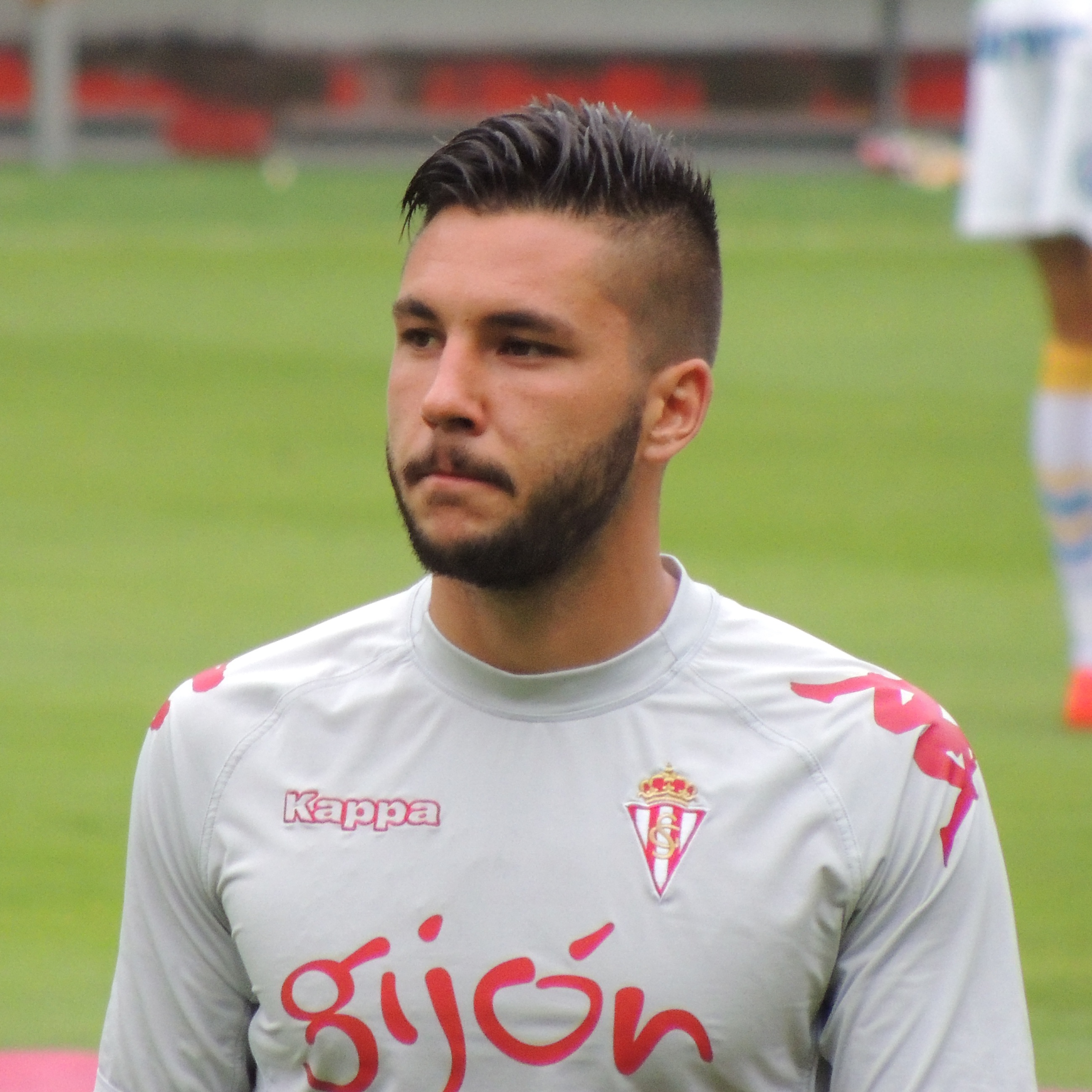 Calentamiento previo a partido contra UD Las Palmas en El Molinón.